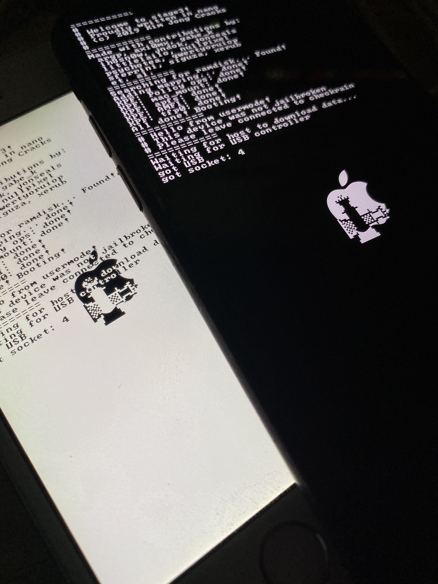 Verbose Boot di due iPhone durante l'operazione di jailbreak.